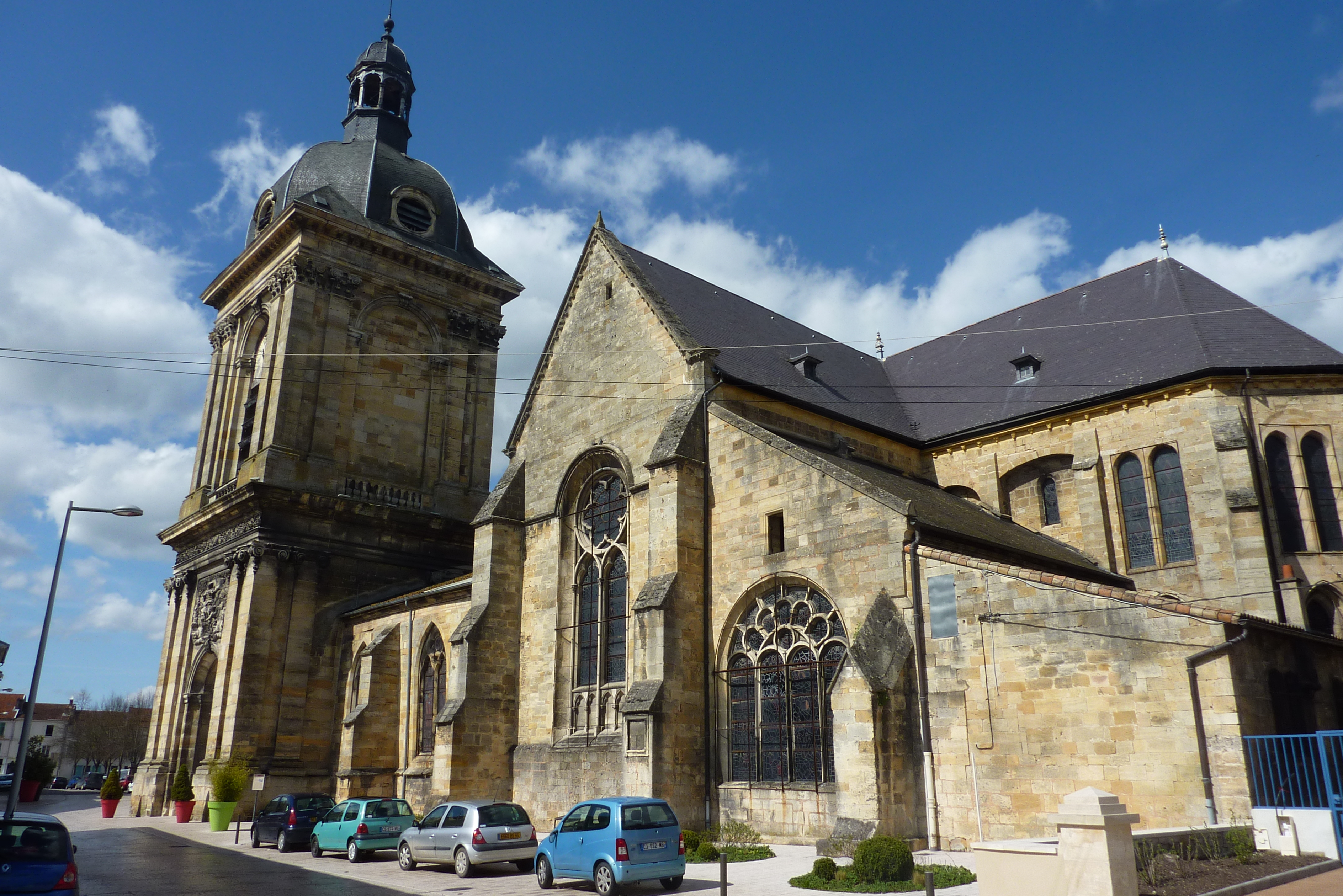 Façade sud de l'église Notre-Dame de Bar-le-Duc, montrant le chœur, le transept, et le clocher-porche.